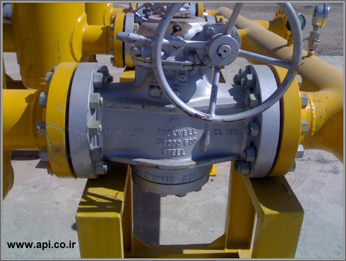 شیر سماوری نصب شده در ایستگاه گاز استان کرمان